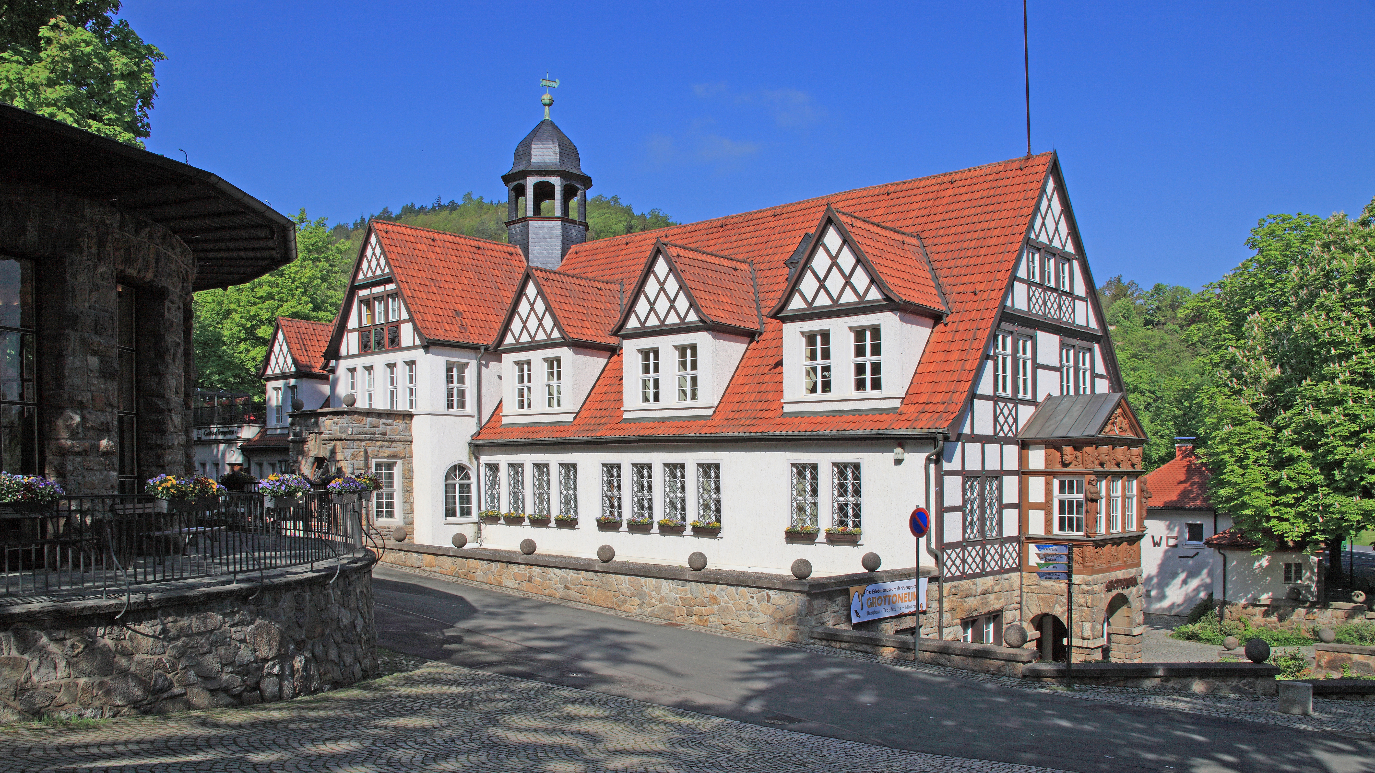 Saalfeld-Garnsdorf, Empfangsgebäude der Feengrotten; ehemaliges Quellenhaus